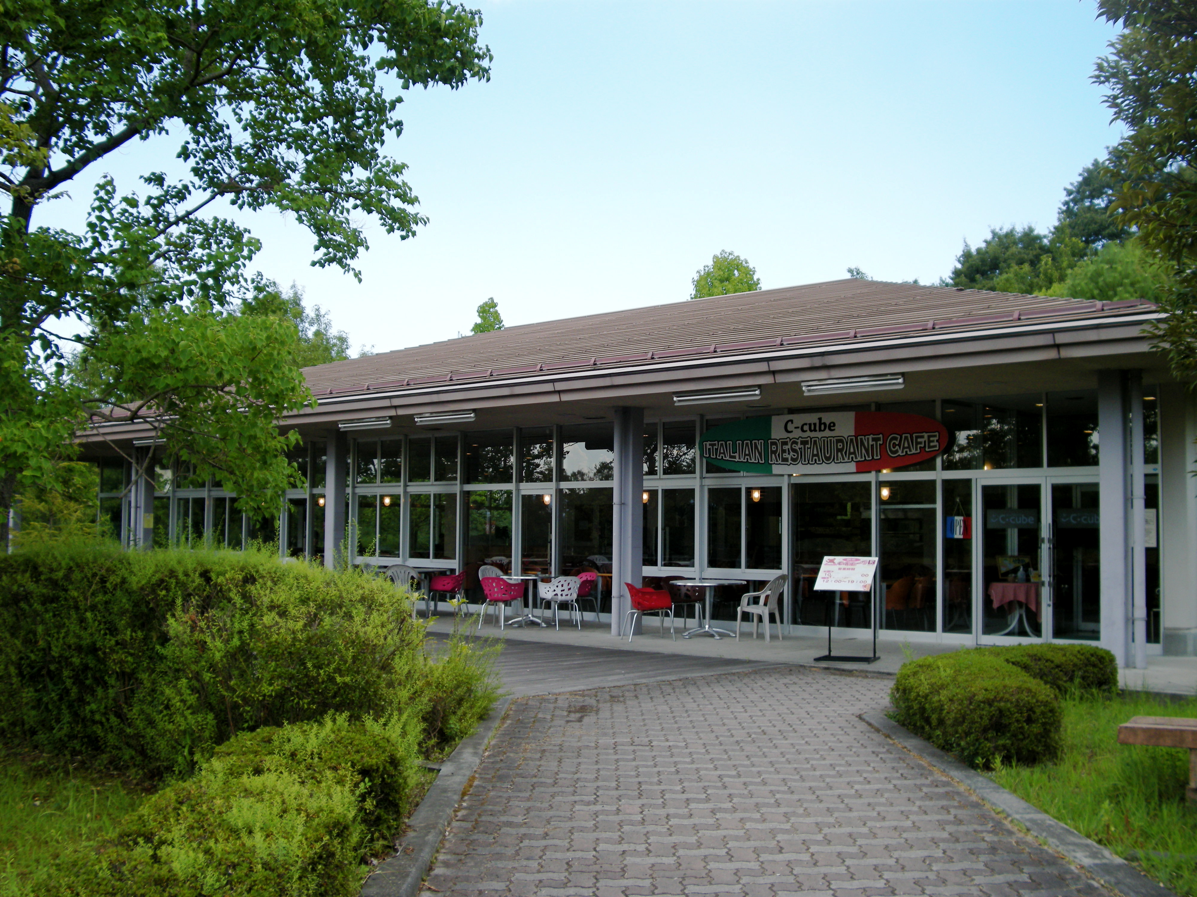 C-Cube, (Cafeteria, Biwako Kusatsu Campus, Ritsumeikan University, Japan)